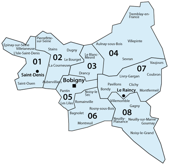 Carte des districts de Seine-Saint-Denis